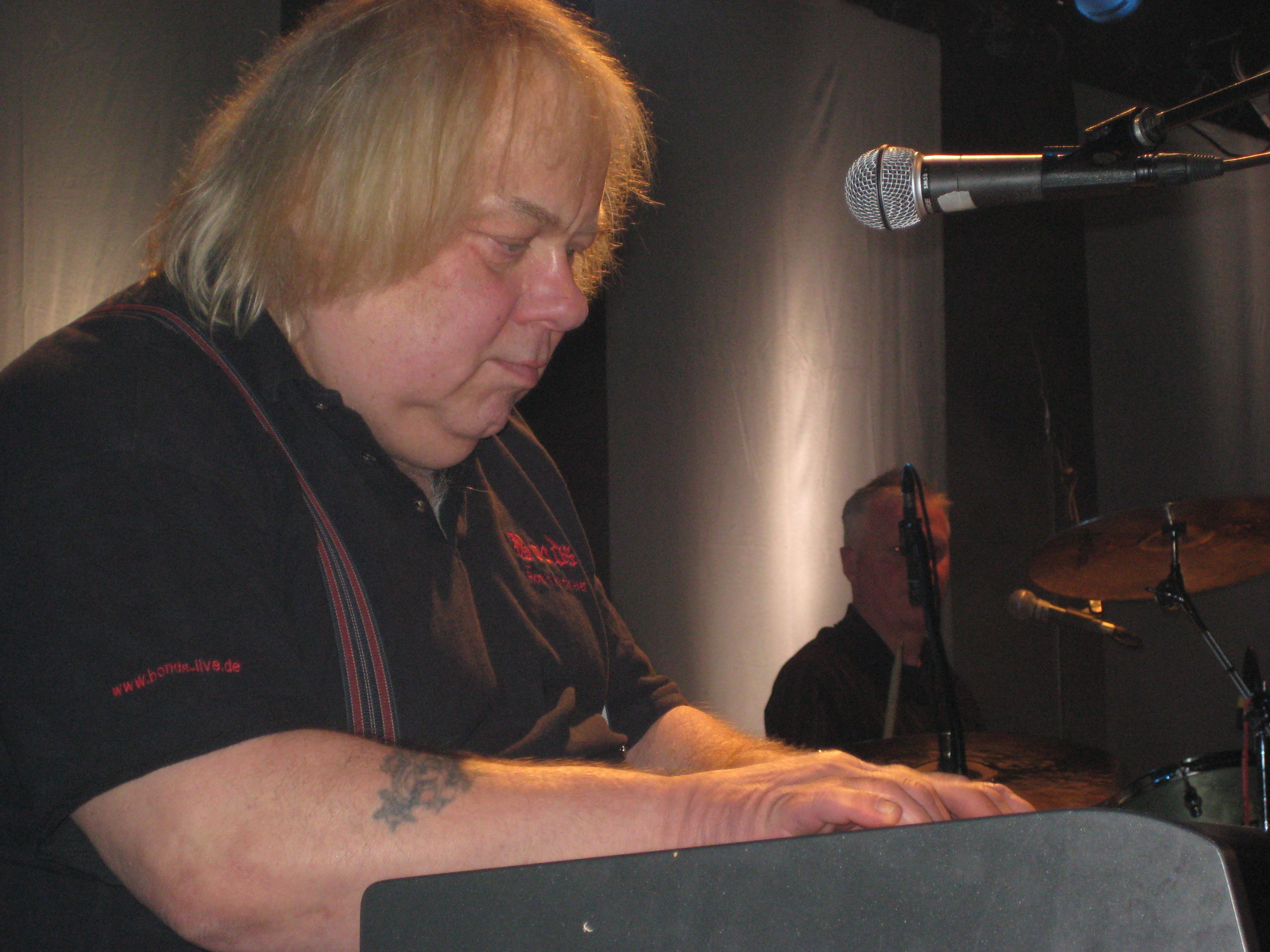 Franz Jarnach, Musiker, Dittsches Schildkröte, am 29. März 2008 bei seinem Auftritt mit Lee Curtis und The Bonds in den Fliegenden Bauten in Hamburg beim 2. The Hamburg Sound Festival - und Dank an Franz J., der mir für ein anderes Foto ein freundliches Lächeln schenkte :-)